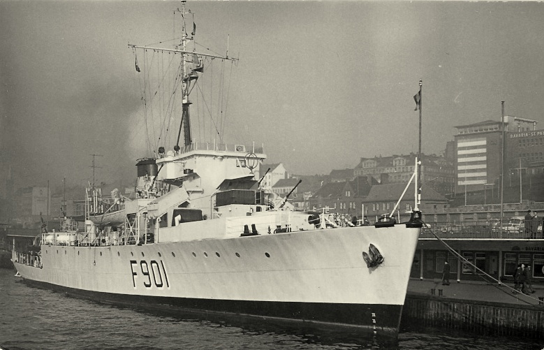 F901 Lecointe (ex-HMCS Wallaceburg de la Marine royale canadienne)